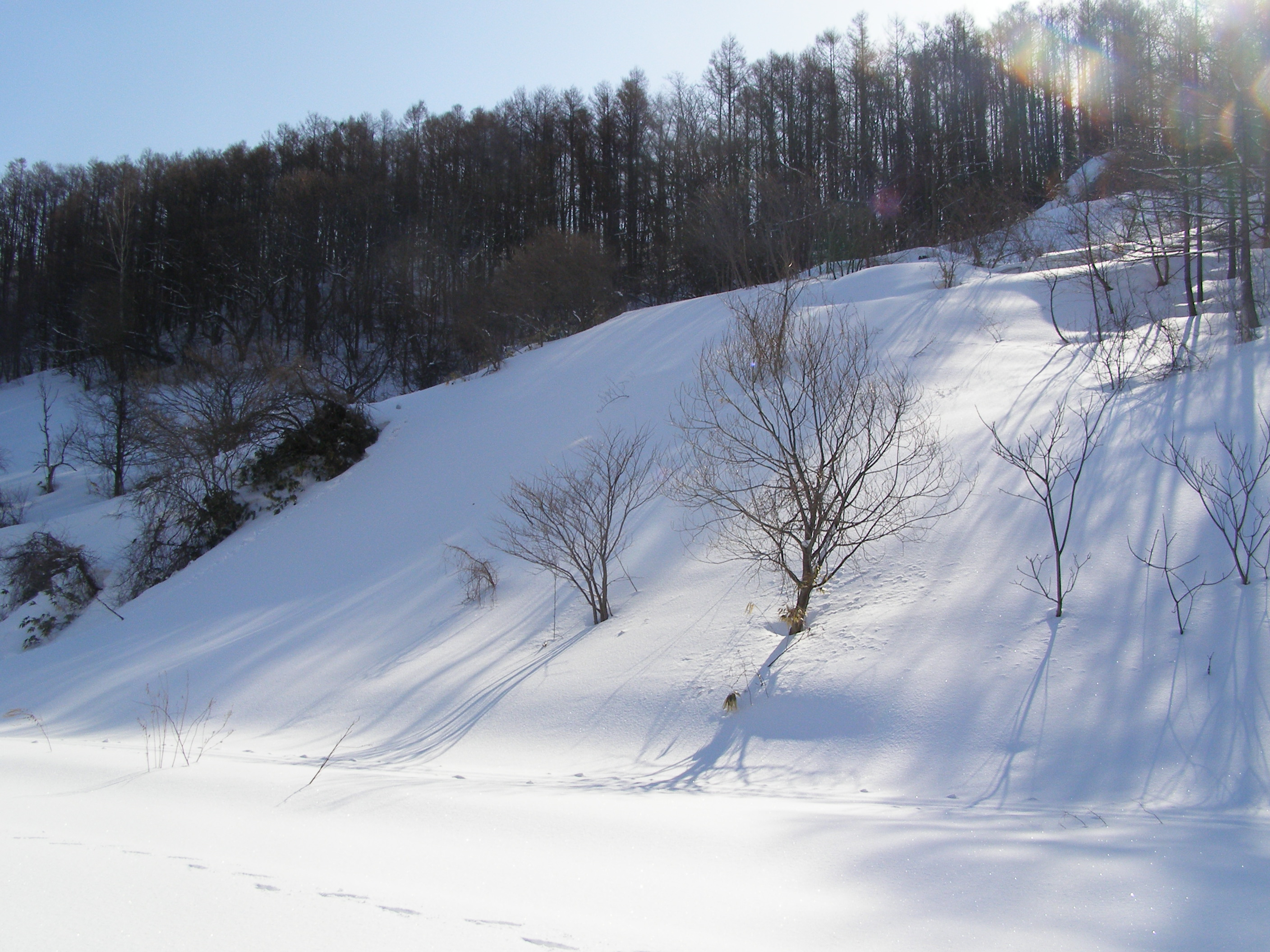 現在の竹鶴シャンツェから北側に約200mのところにある旧竹鶴シャンツェ